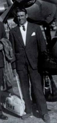 El golfista Ángel Miguel